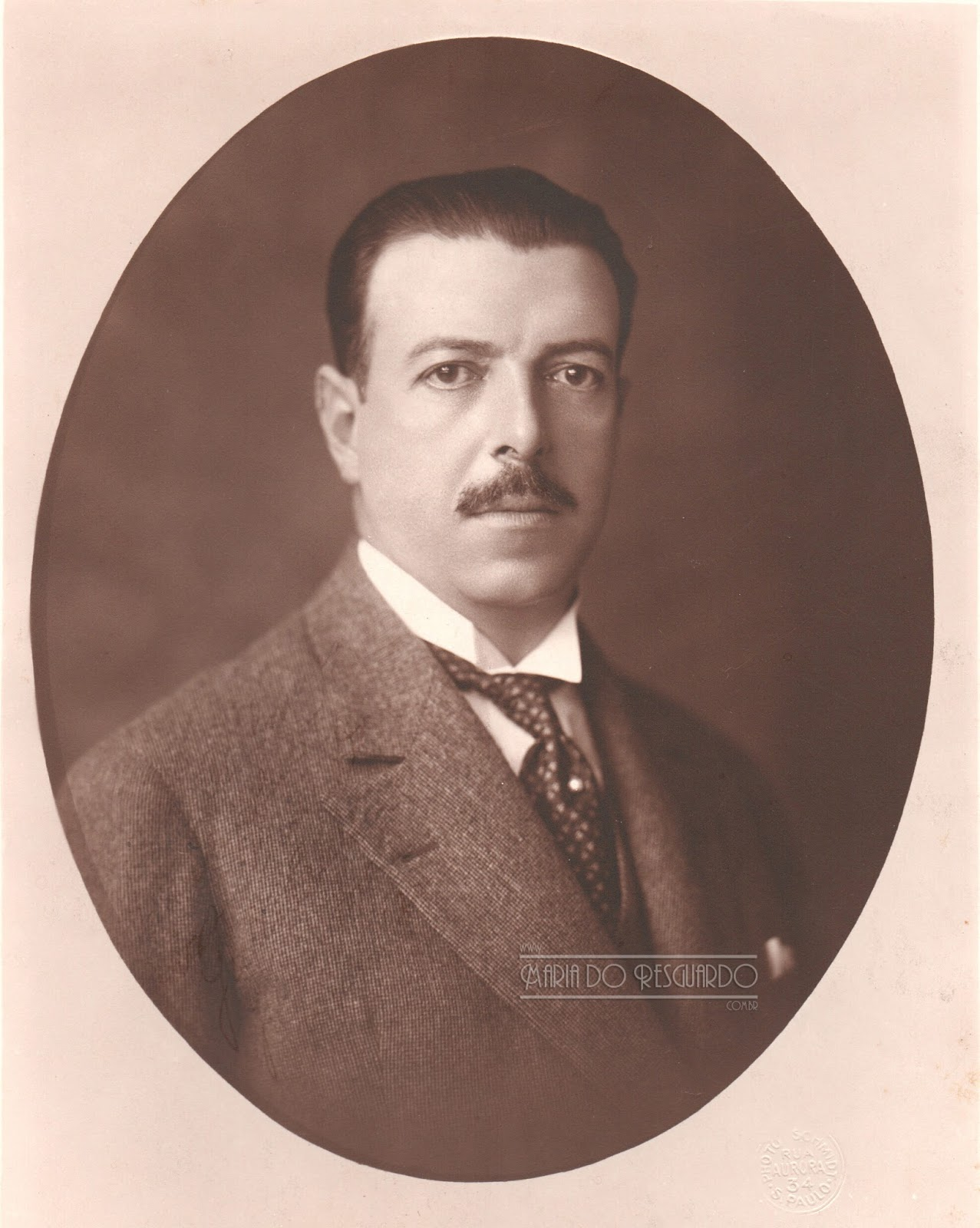 Foto de Júlio Prestes em 1930